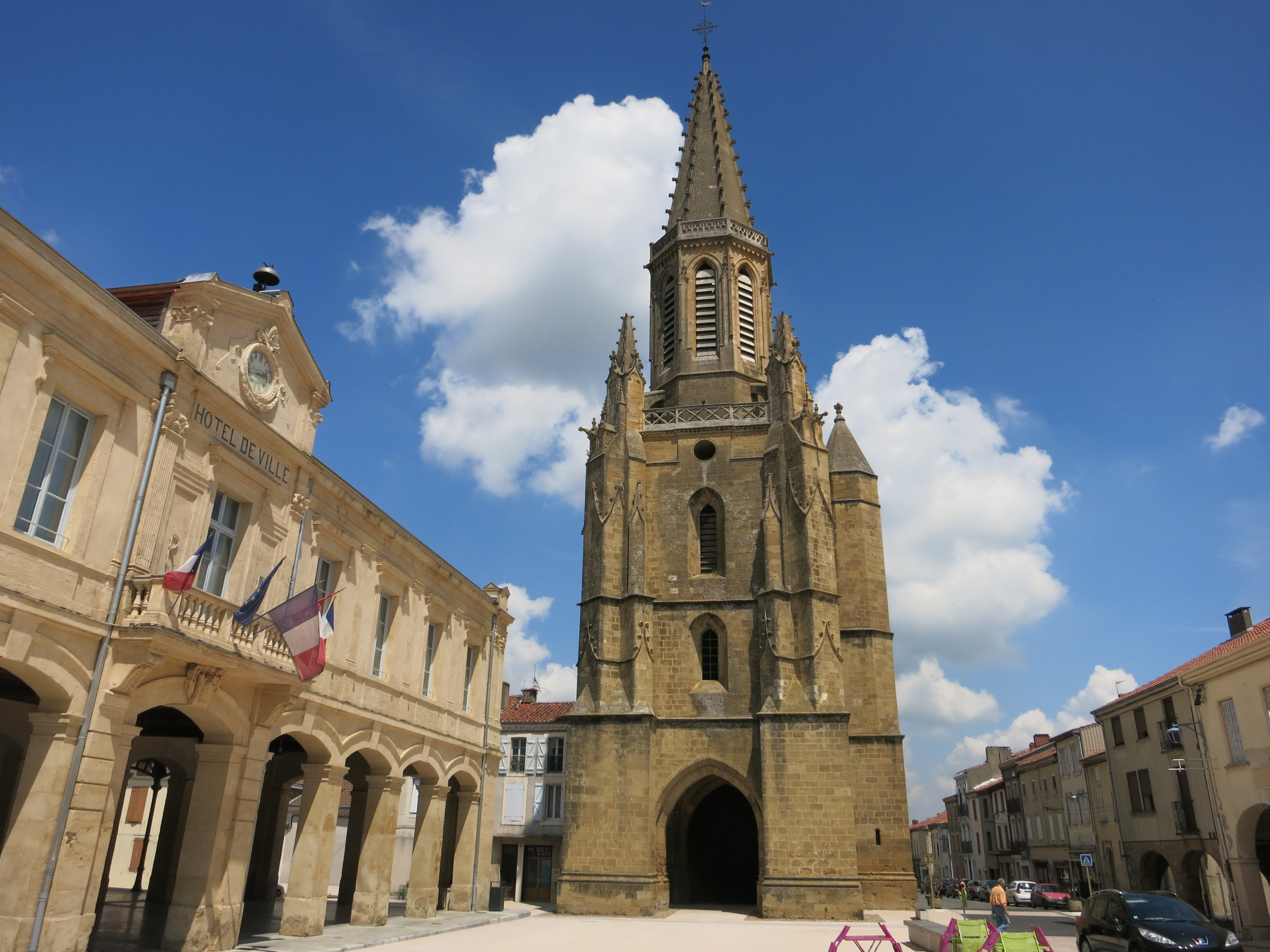 église et mairie de Boulogne-sur-Gesse